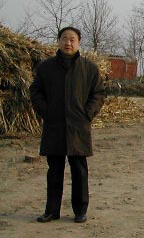 Mo Yan